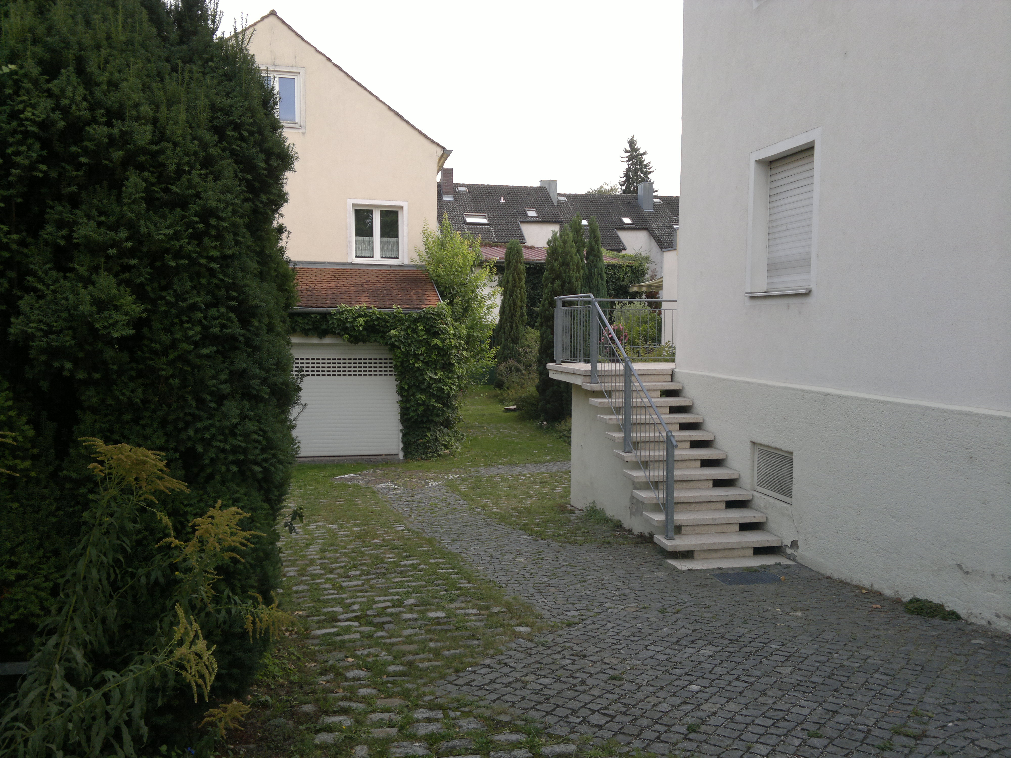 Ehemaliges Firmengelände der Orgelbaufirma Hirnschrodt in Regensburg. Links Intonierwerkstatt (heute Garagen), dahinter Maschinenraum, darüber Planungsbüro. Im Hintergrund Montagehalle. Rechts Wohnhaus, dahinter (nicht sichtbar) Pfeifenwerkstatt.